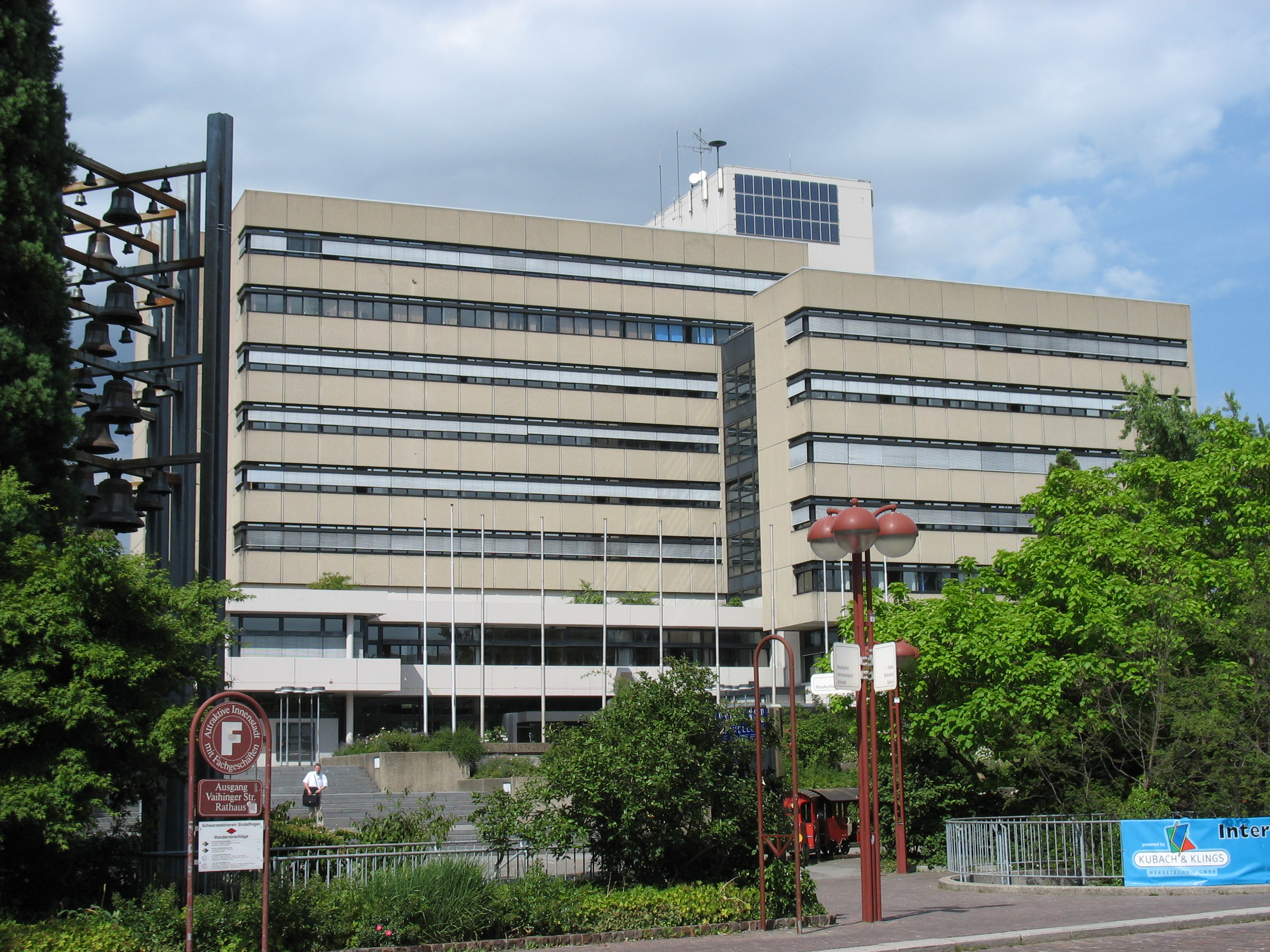 Das Sindelfinger Rathaus in der Innenstadt Sindelfingens Sonstiges: andere Rathäuser Sindelfingens: Bild:Mittleres Rathaus Sindelfingen.JPG, Bild:Sindelfingen altes rathaus.jpg. Sindelfingen, Baden-Württemberg, Deutschland.